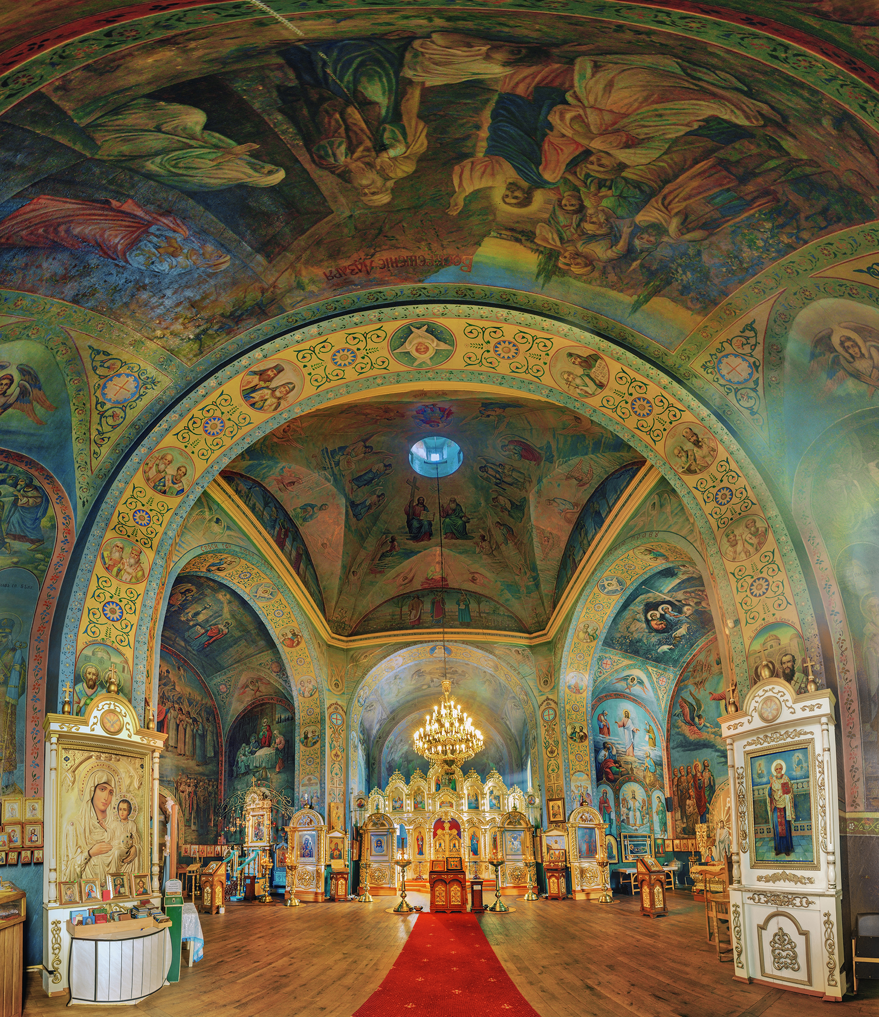 Спасо-Преображенська церква (мур.), с.Тригір'я